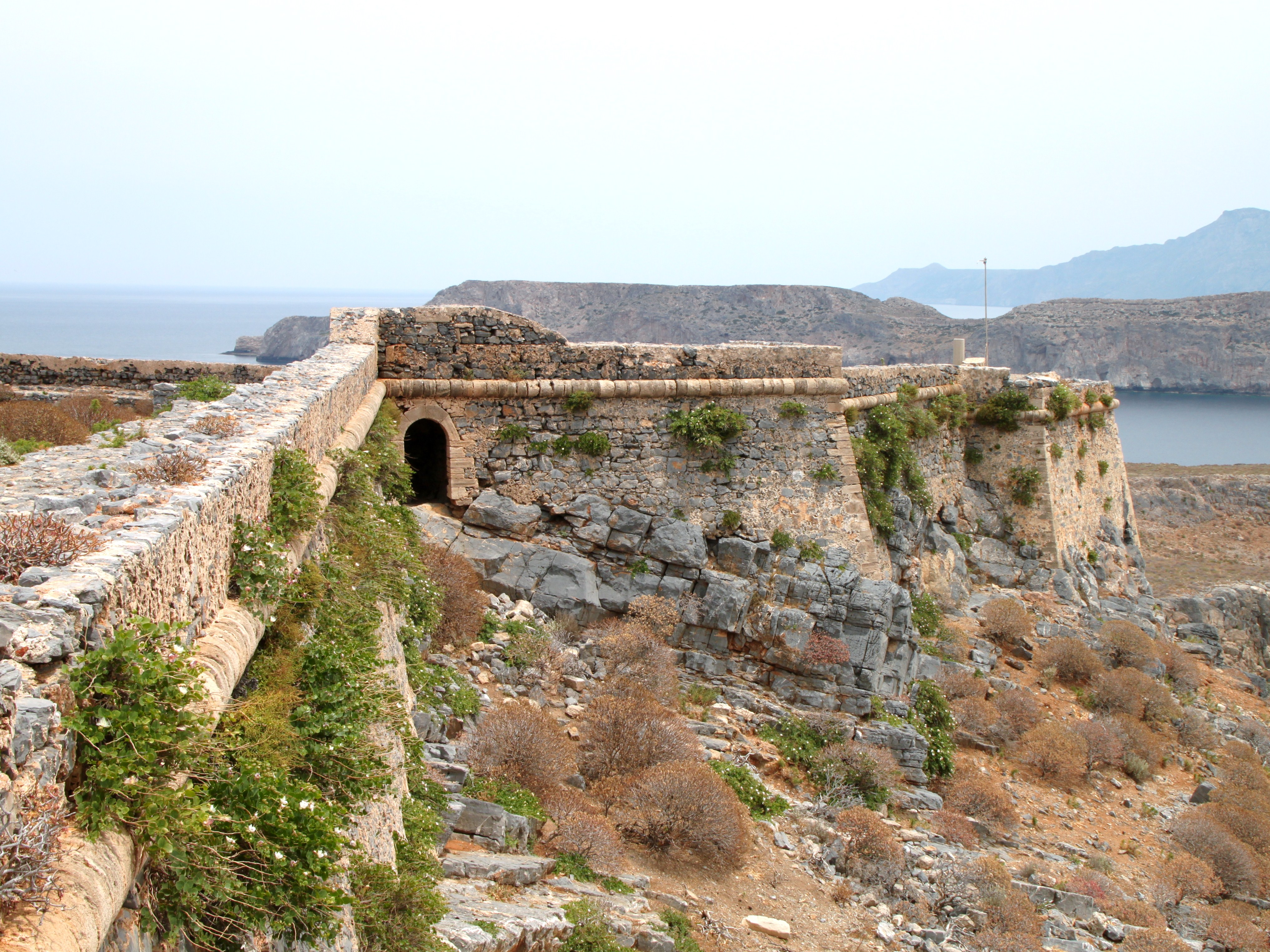 Festungsruine Kastro Gramvousas (Κάστρο Γραμβούσας) auf Imeri Gramvousa (Ήμερη Γραμβούσα), Insel in der Gemeinde Kissamos, Präfektur Chania, Kreta, Griechenland